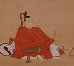 小堀政房の肖像。